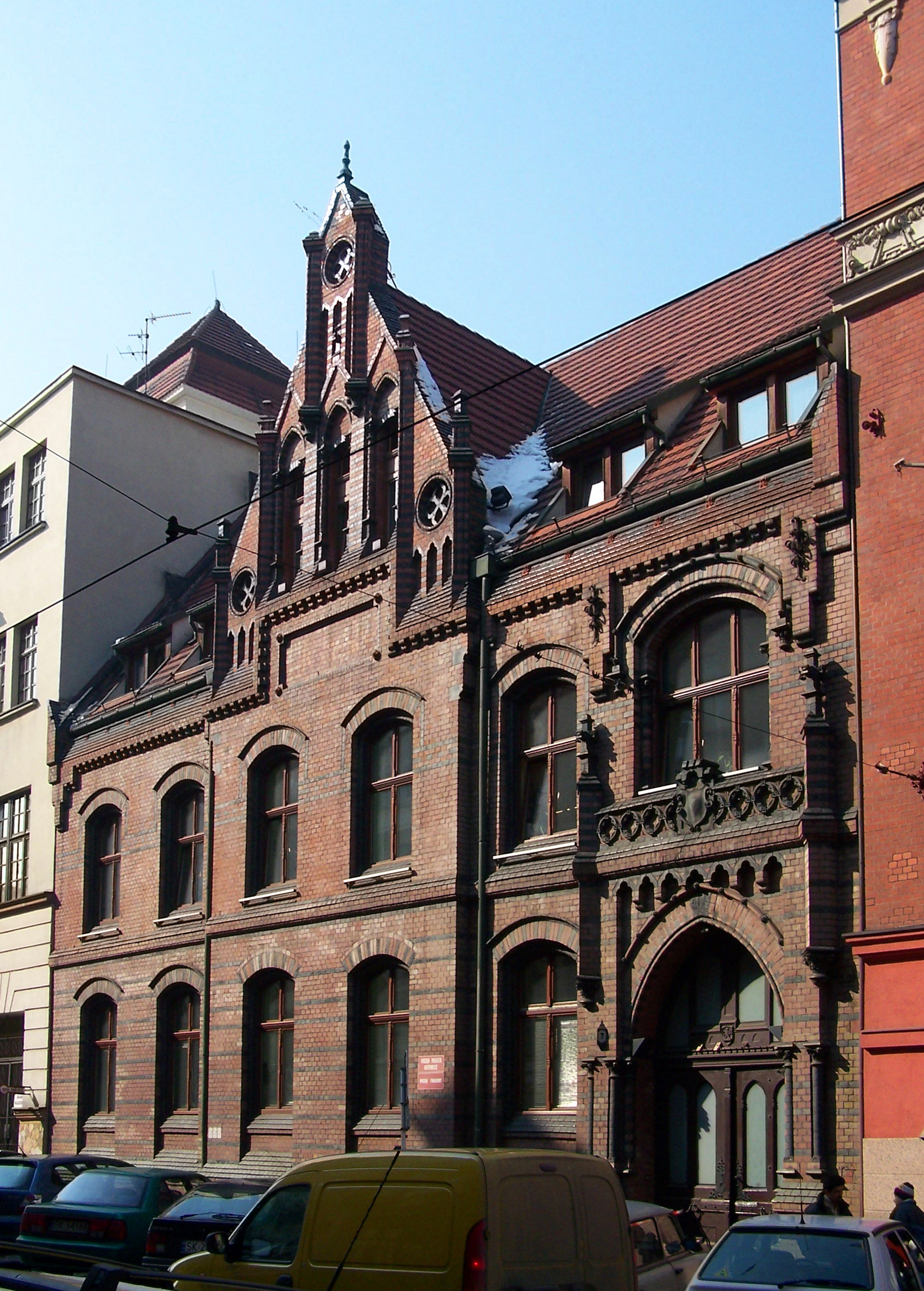 Katowice, ul. Pocztowa 7 - budynek z końca XIX wieku, Wydział finansowy Urzędu Miasta (zabytek nr A/1305/83 z 7.07.1983)